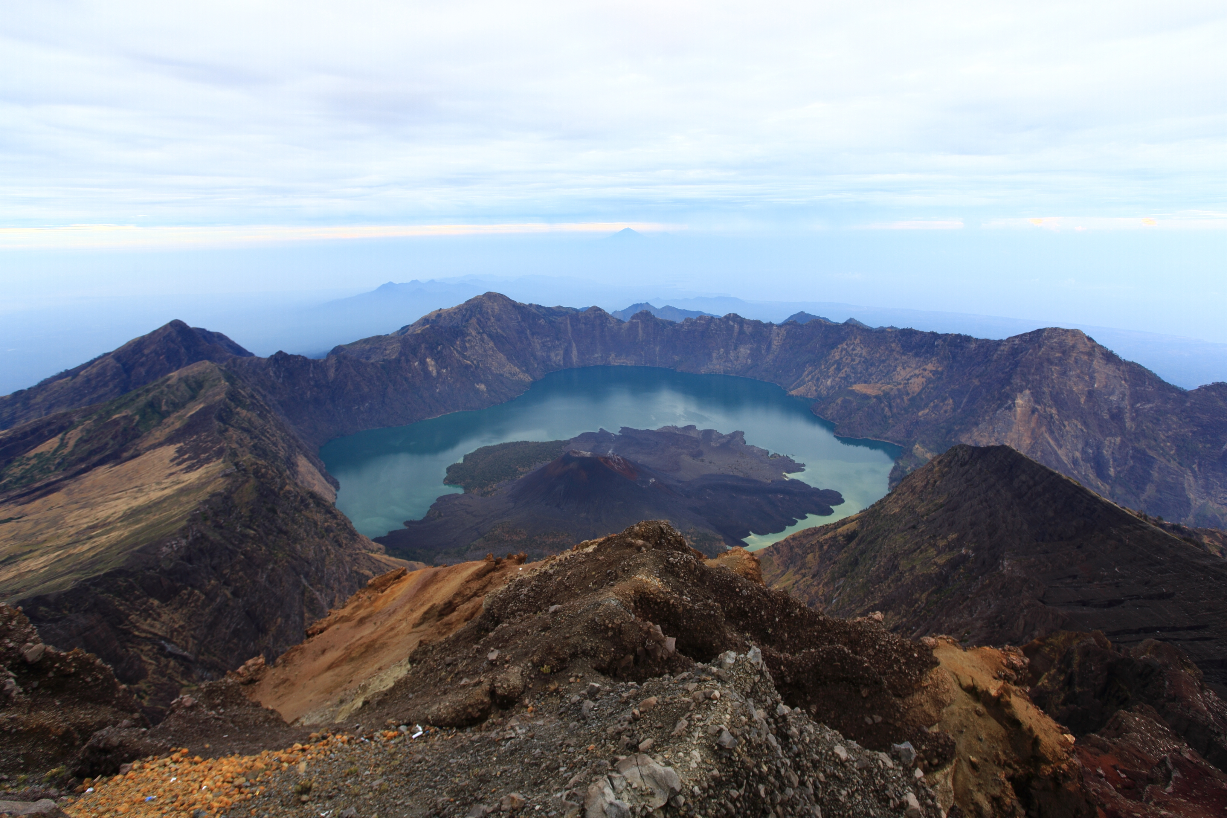 Mount Rinjani in Indonesia